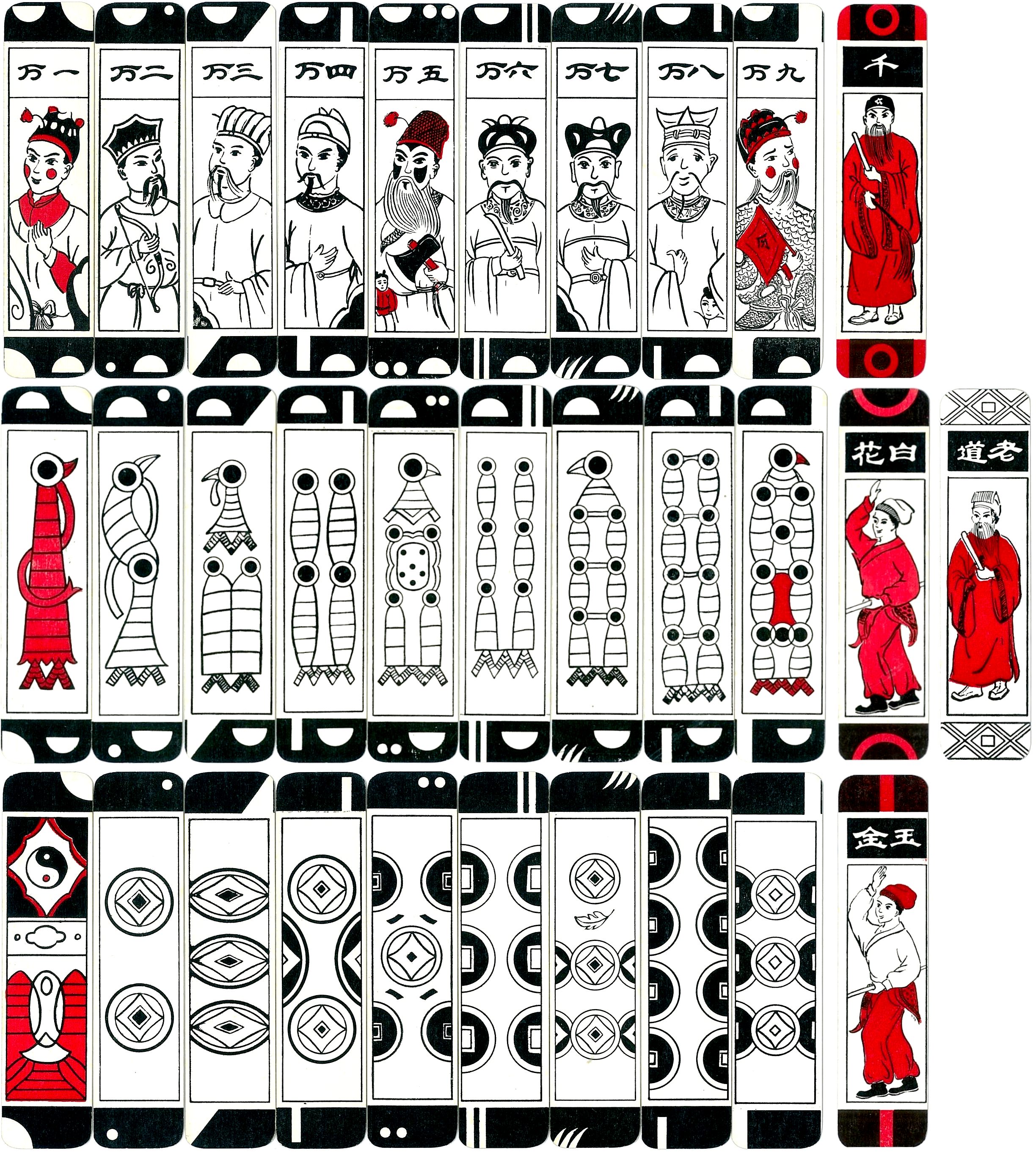 中文（台灣）: 天津的傳統紙牌